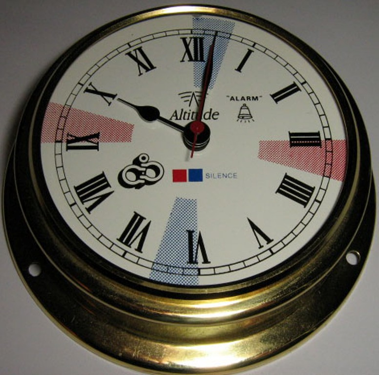 Montre de station radio marine avec : En rouge les périodes de silence radio de 3 minutes sur la fréquence 500 kHz. L'appel de routine, de sécurité, d'urgence est autorisé entre l'heure H + 18 à H + 45 et entre H + 48 à H + 15. En bleu les périodes de silence radio de 3 minutes sur les fréquences: 2174,5 , 2182 et 2187,5 kHz. L'appel de routine, de sécurité, d'urgence est autorisé entre l'heure H + 03 à H + 30 et entre H + 33 à H + 00. Les radiocommunications pour la détresse sont libres. La montre est à l'heure en Temps universel coordonné.